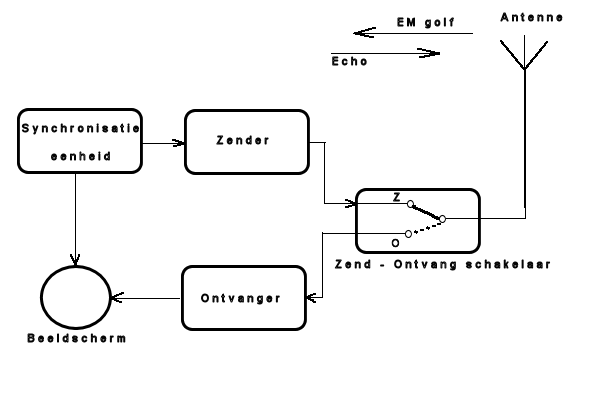 Principe schema radar